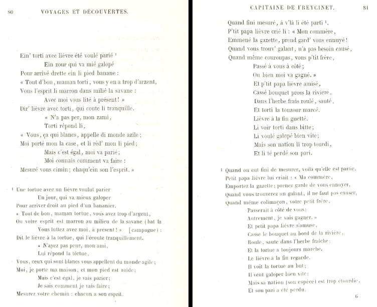 Arthur Mangin, Voyages et Découvertes outre-mer au XIXe siècle, 1863 ː Louis Henri de Saulces de Freycinet à Port-Louis.